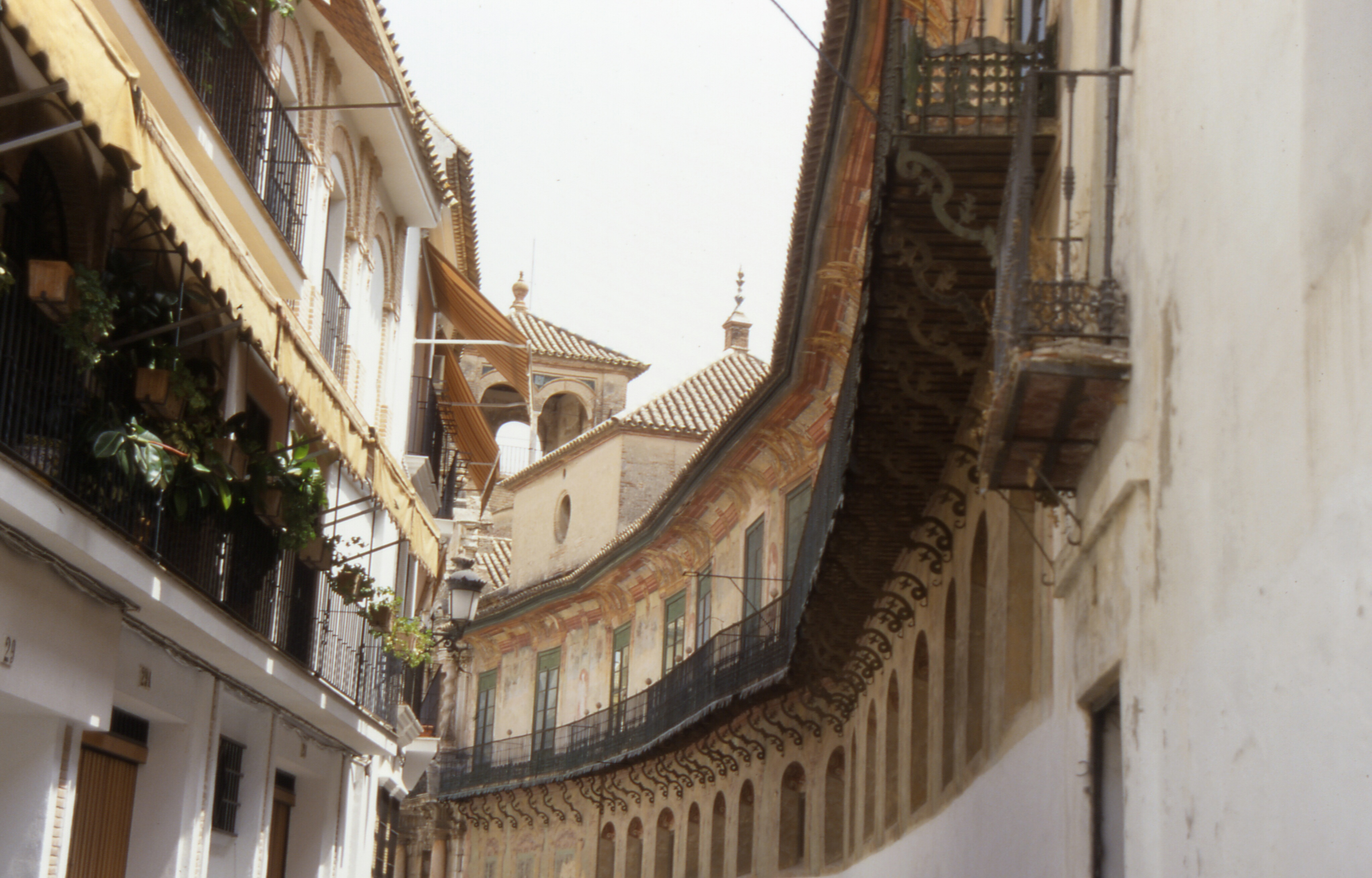 Écija Ansicht 4